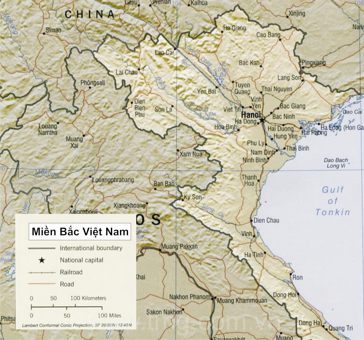 Miền Bắc Việt Nam - Northern of Vietnam